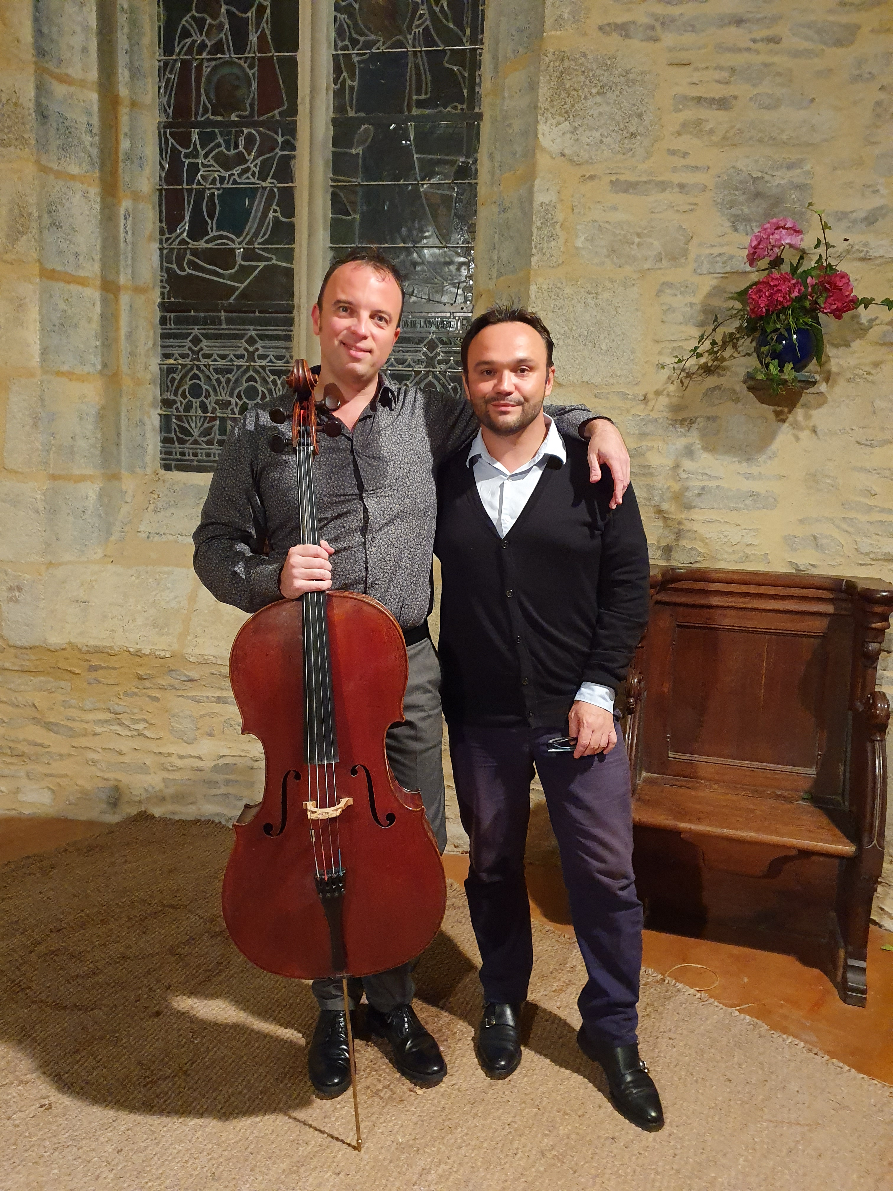 Patrick Langot (à gauche avec le violoncelle) et Benoît Menut (à droite) lors d'un concert du Cycle Musical de la Chapelle de Kersaint.